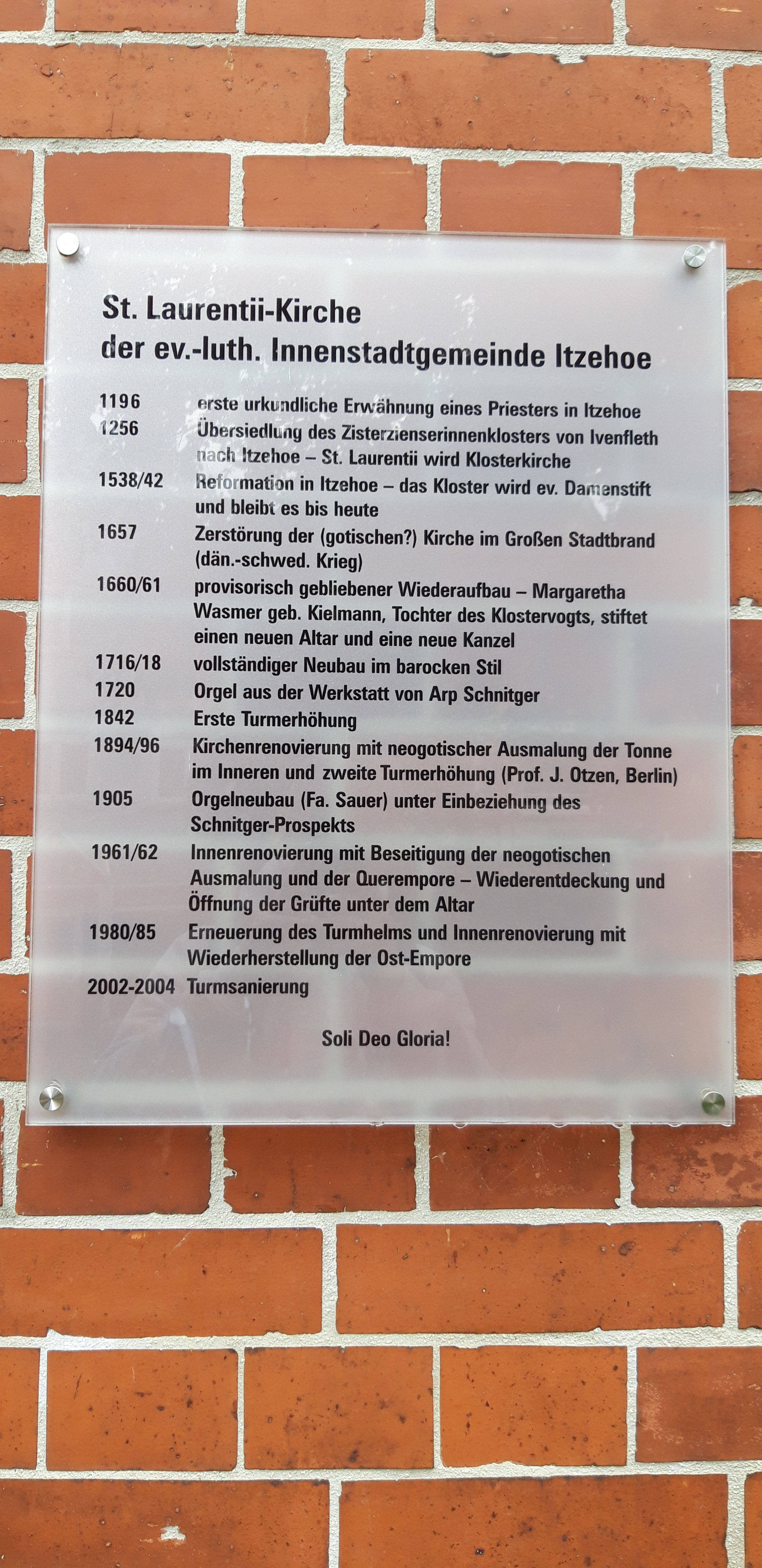 Tafel vor Eingang der Kirche